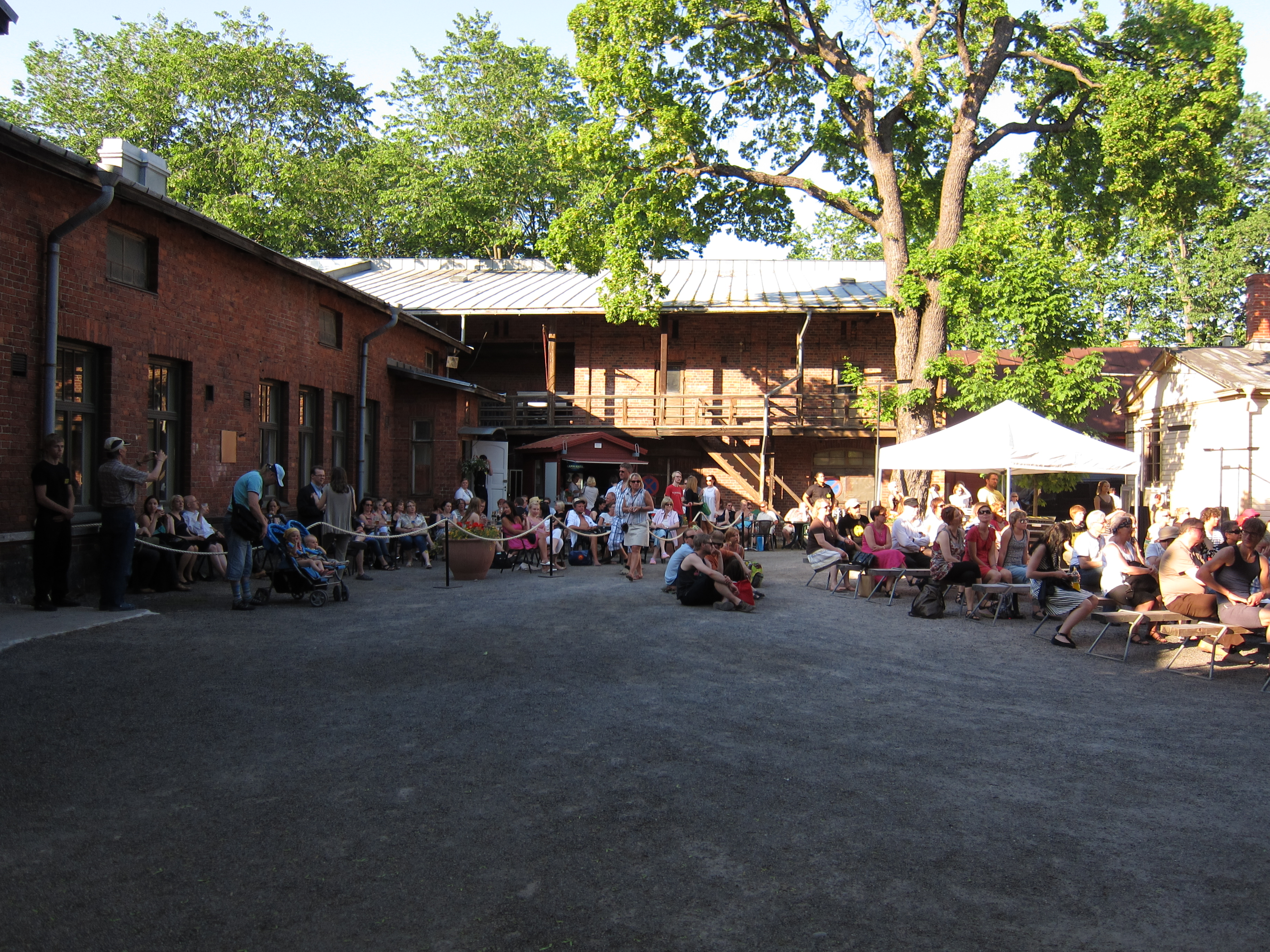 Fortuna korttelin avajaiset 8.6.2011. Yleiskuva rakennuksista